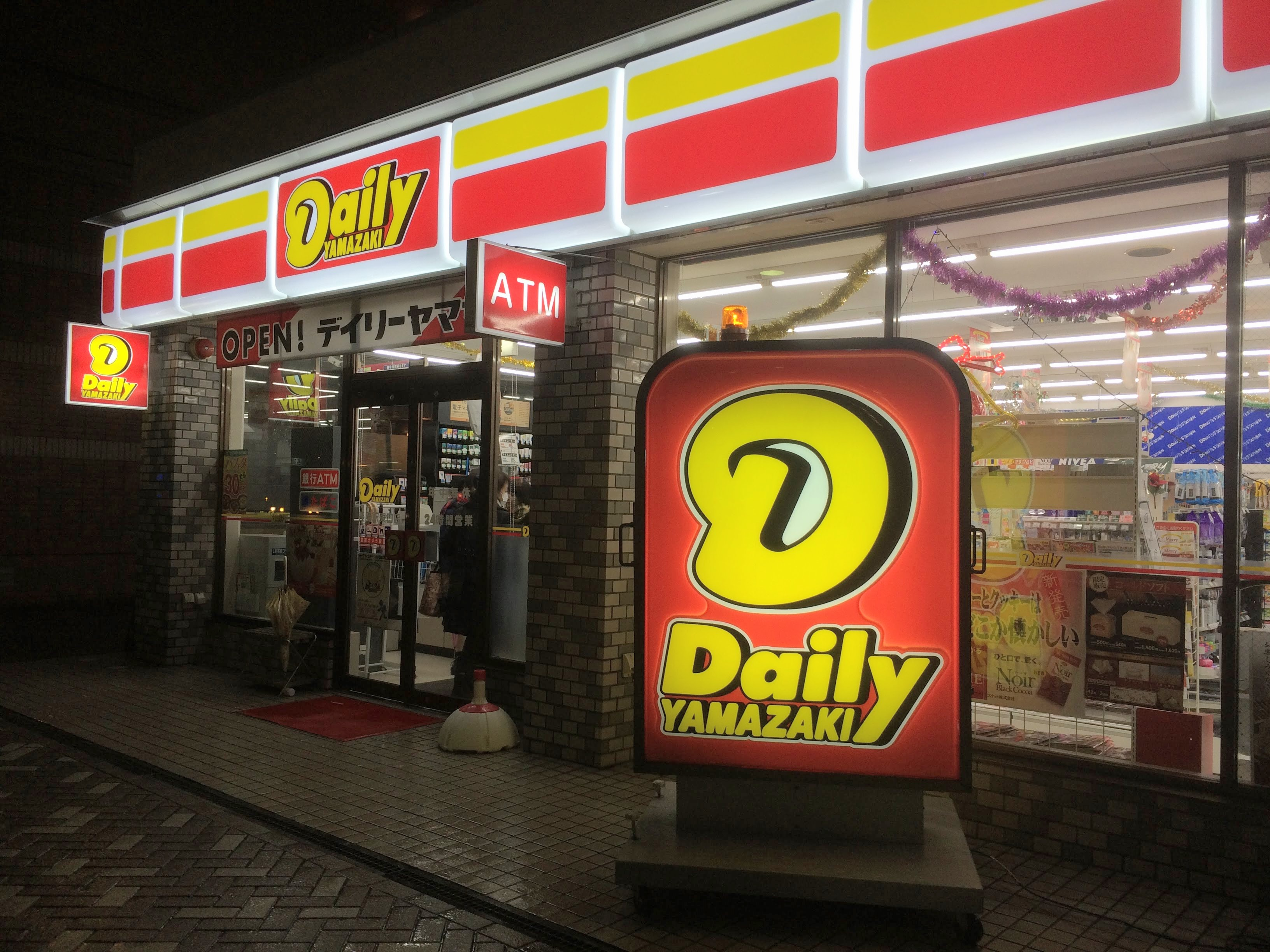 デイリーヤマザキ 長岡駅東口店（旧：JR東日本グループ コンビニJC）